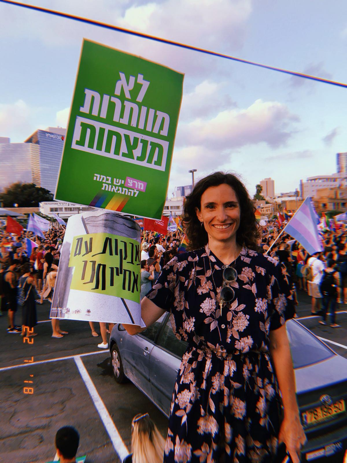 ענת ניר בזמן מחאת הלהט"ב, 2018